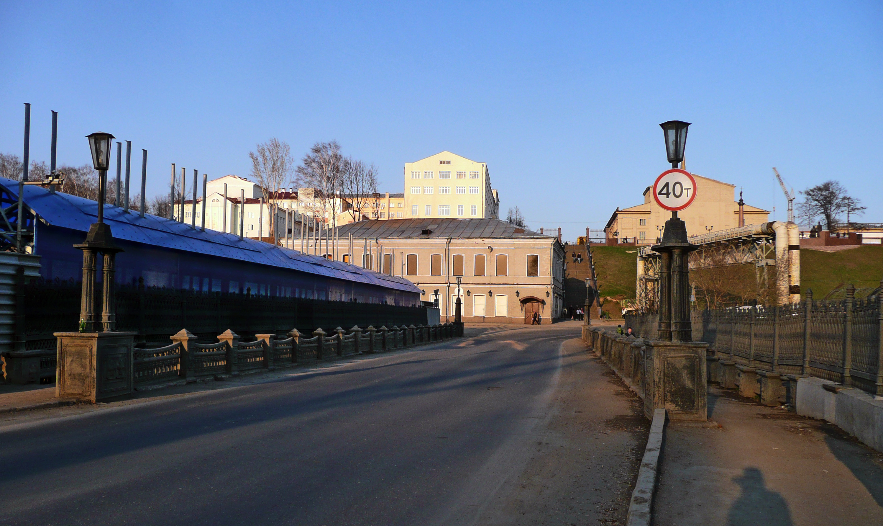 Фонари на ижевской плотине